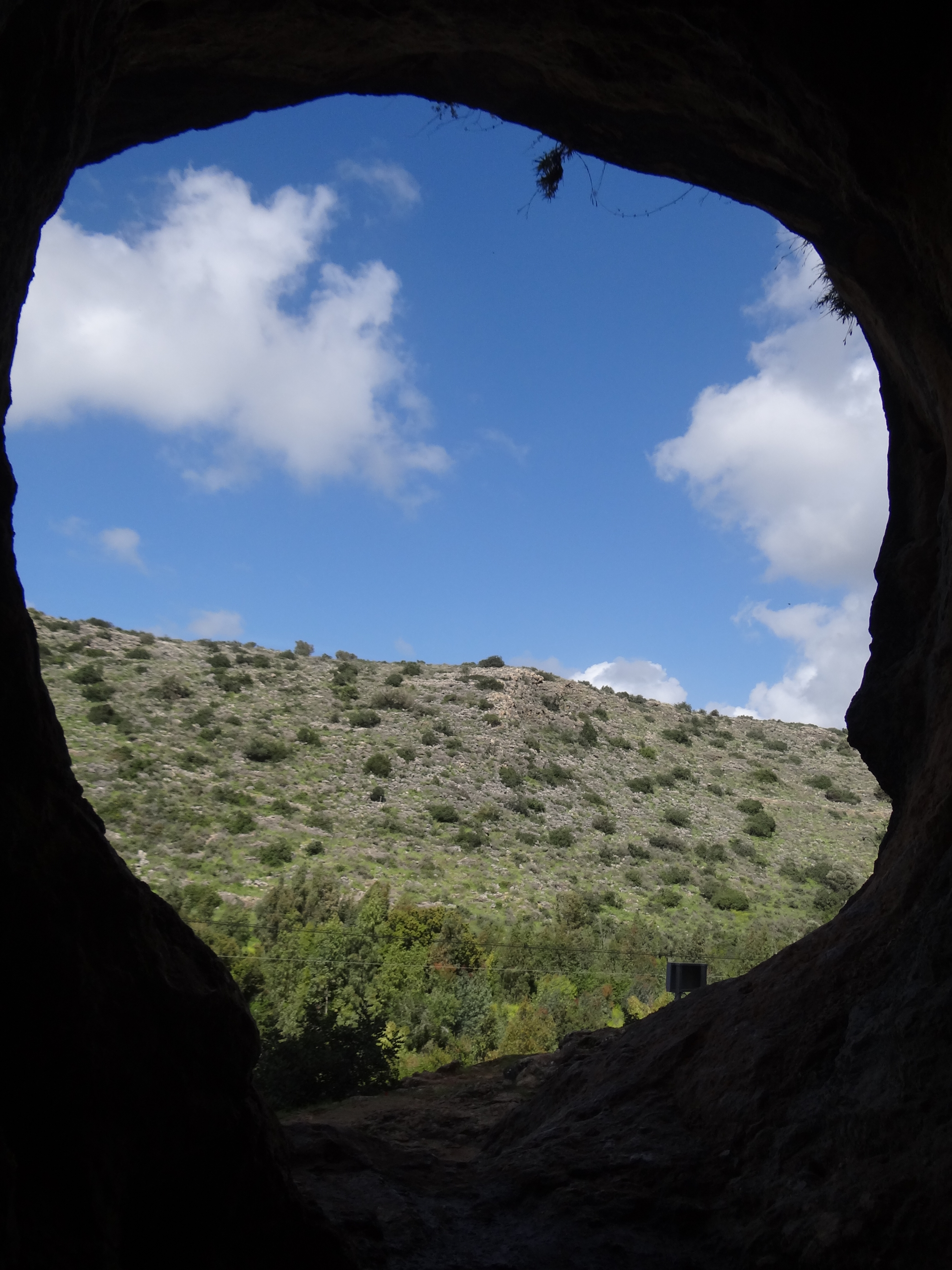 מערת הגדי היא אתר ארכאולוגי-פרהיסטורי מן התרבות המוסטרית של התקופה הפלאוליתית התיכונה במערב הכרמל. האתר, הכולל מערה קטנה וטרסה טבעית בפתחה, צילום מתוך המערה החוצה לעבר הנוף הנשקף מהמערה של הכרמל ונחל מערות